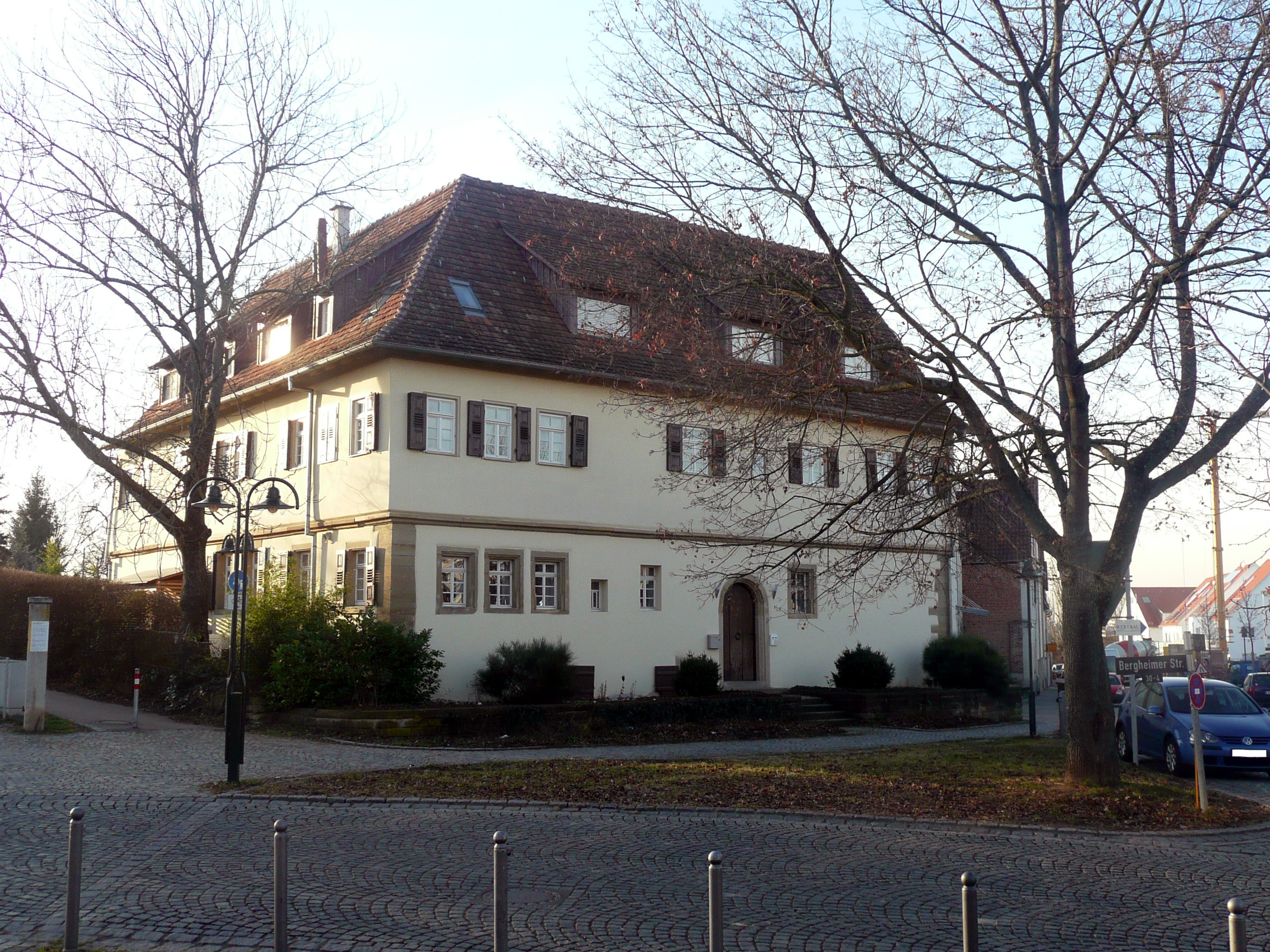 Die Linde, ehemalige Universitätspflege zu Weil im Dorf